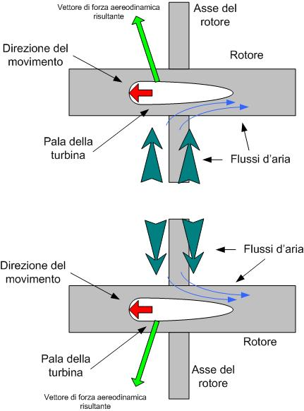 Wells turbine - ITA